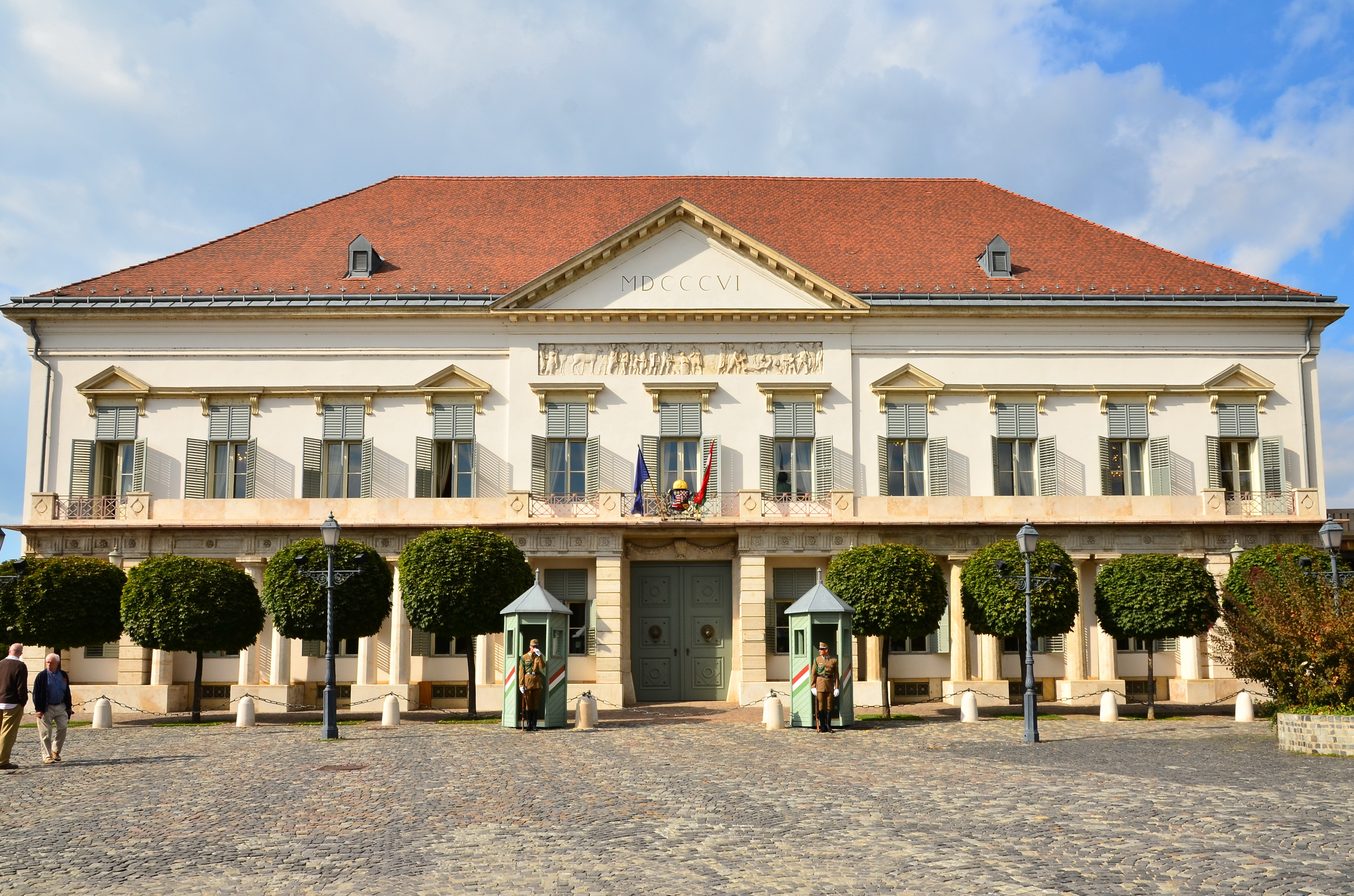 Sándor-palota This is a photo of a monument in Hungary. Identifier: 137